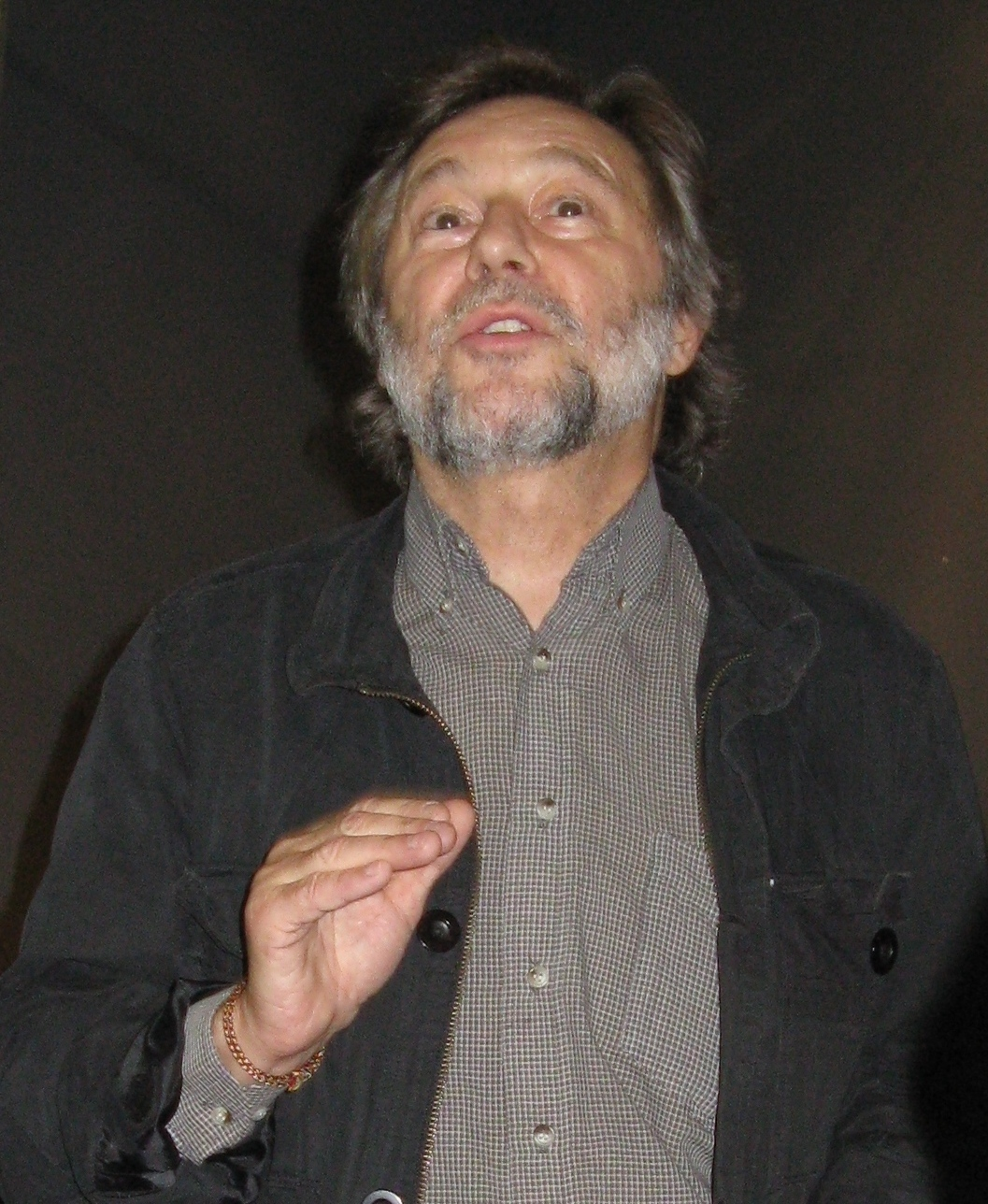 Włodzimierz Staniewski - założyciel i dyrektor teatru w Gardzienicach